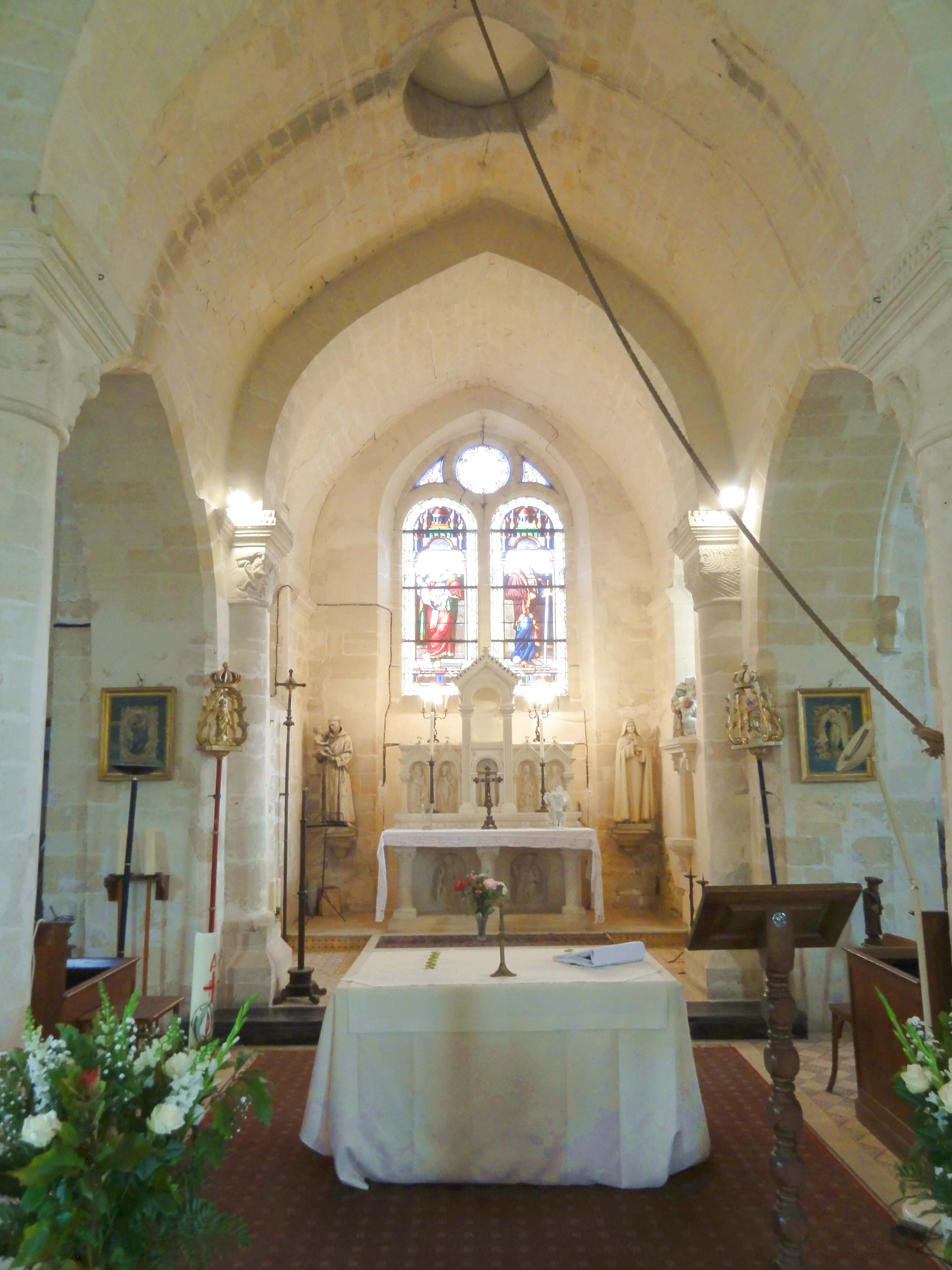 Intérieur de l'église - voir titre.